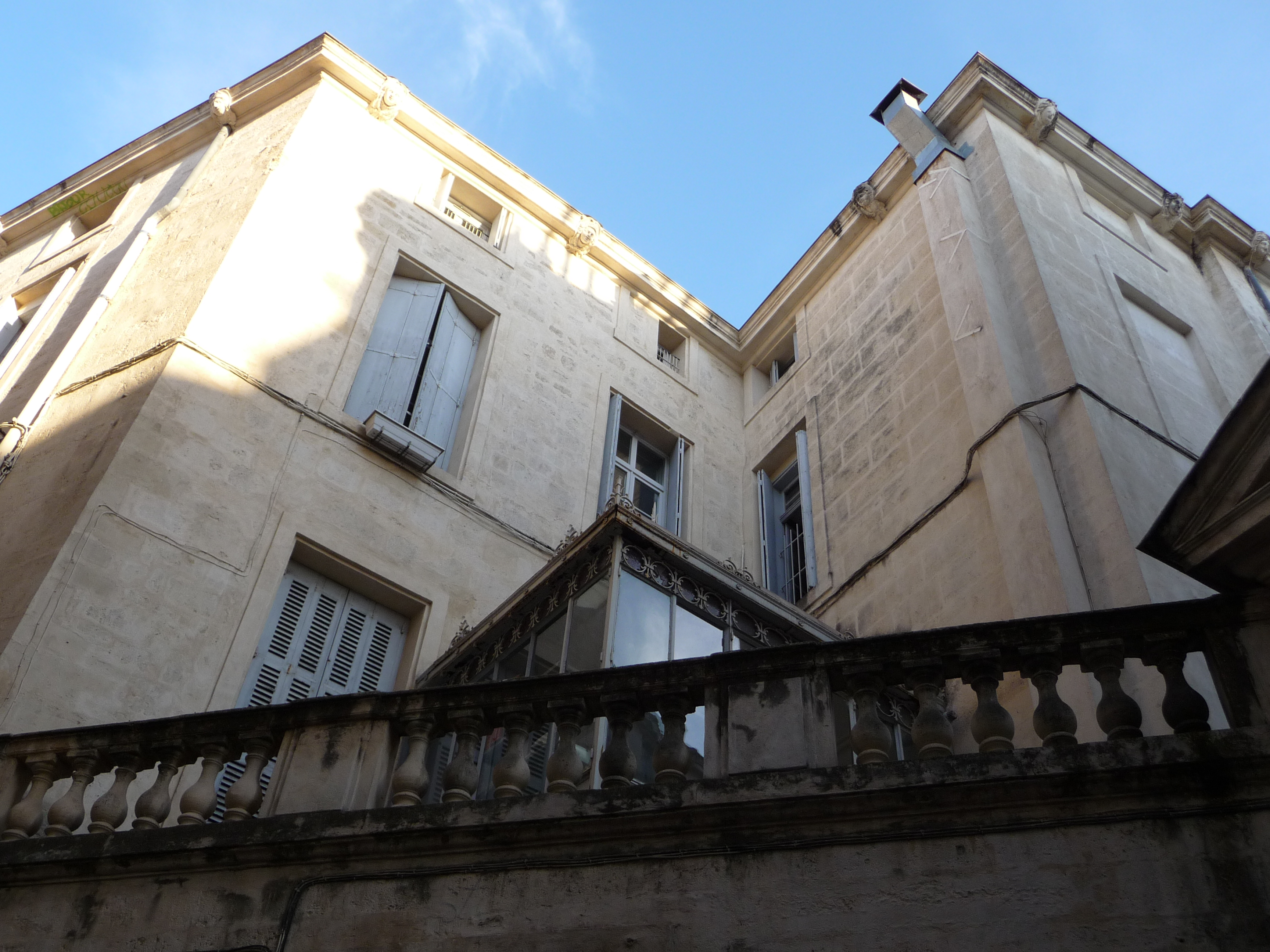 Hôtel d'Uston (Montpeller) .